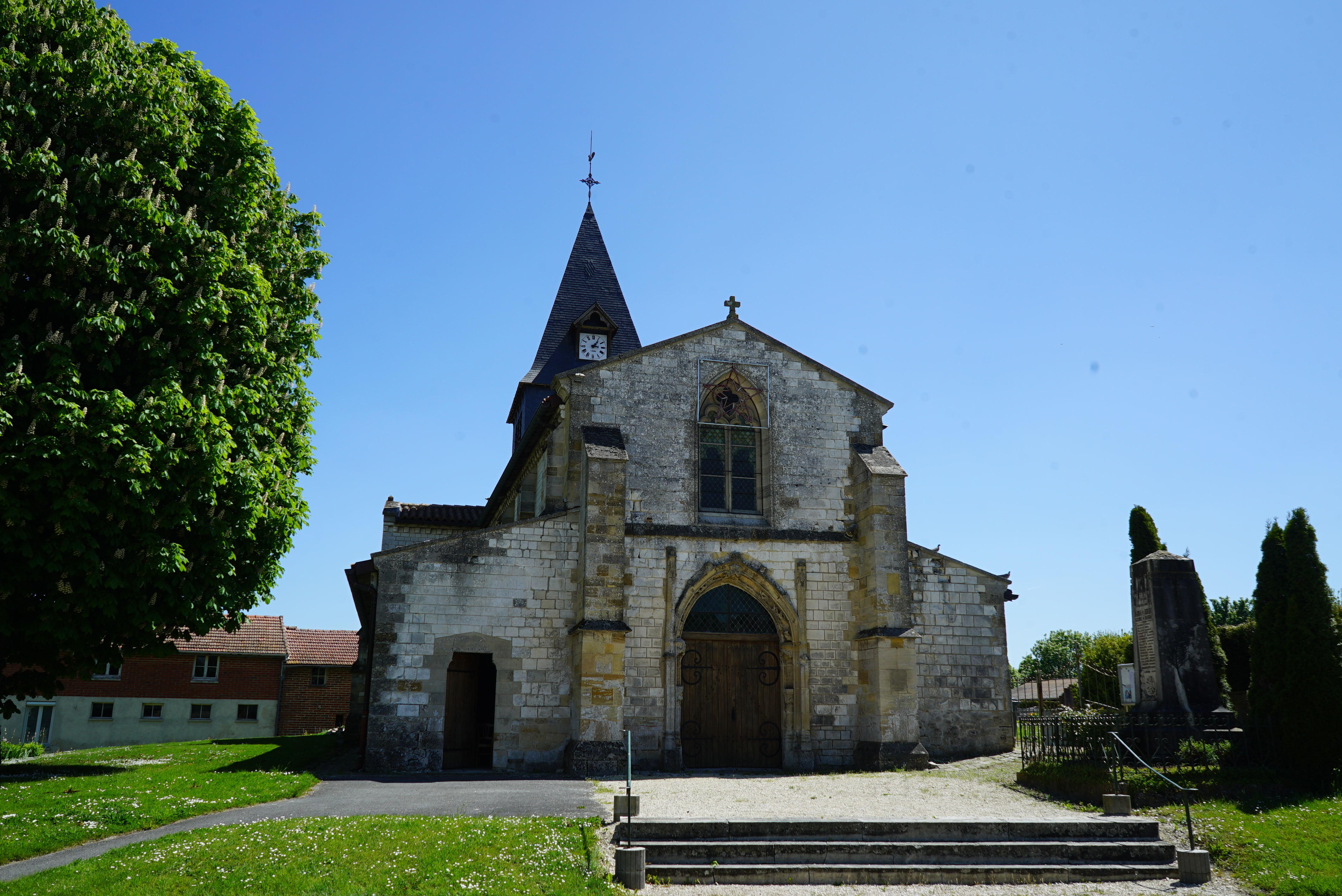 image de l'église.